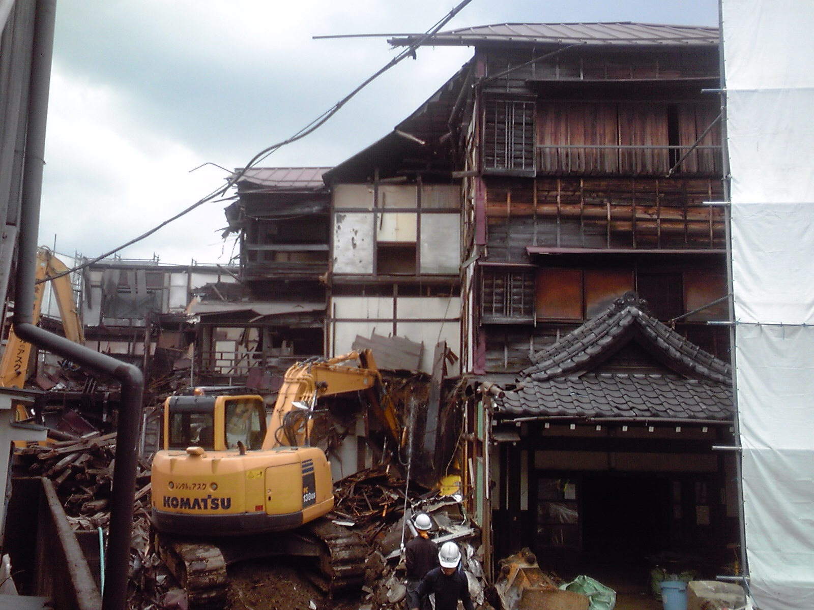 解体中の本郷館。